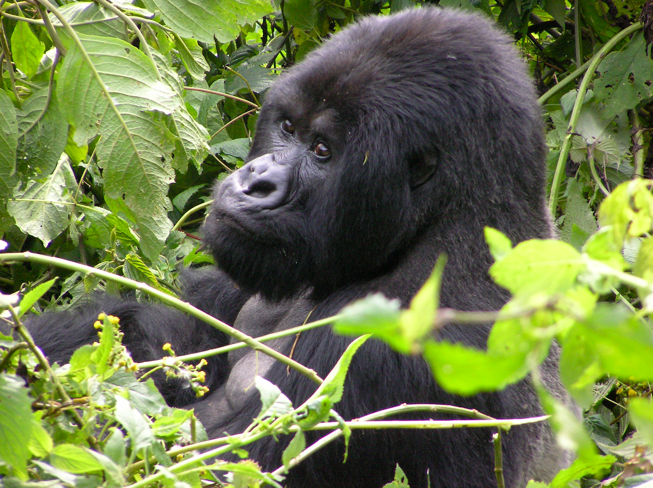 L'un des 11 individus du groupe Sabyinyo - Parc National des Volcans - Province du Nord - Rwanda